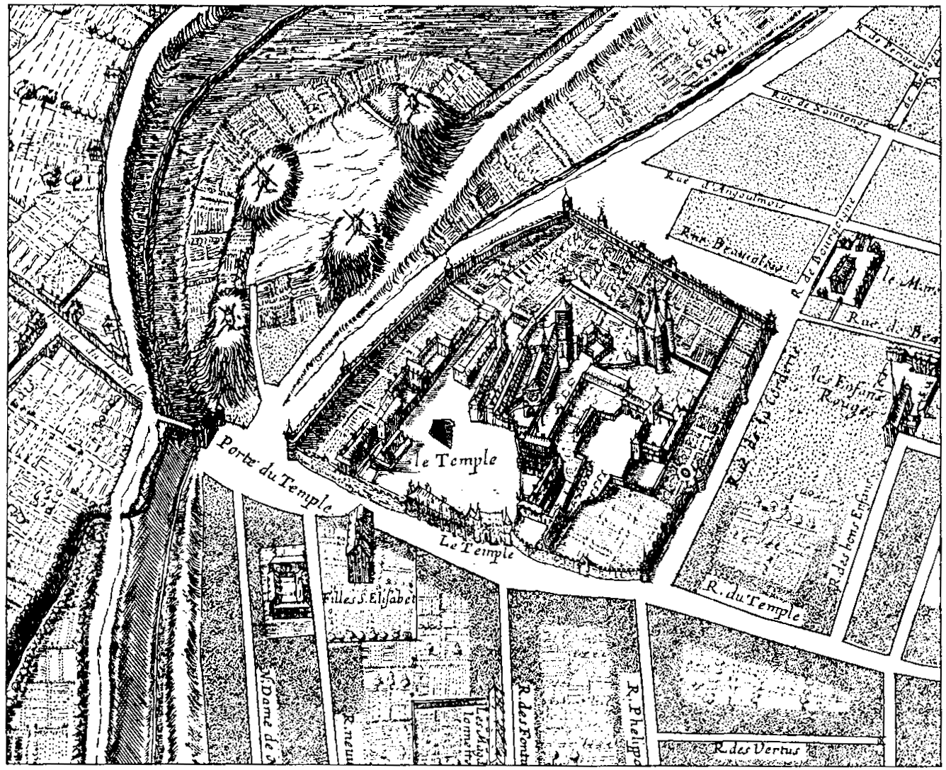 Hoffbauer, Théodor-Joseph-Hubert nach Gombust. Quartier du Temple, en 1652, facsimilierter Stich, aus: Hoffbauer 1885, S. 373